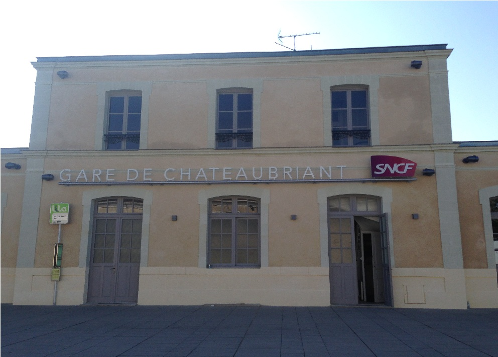 Gare de Châteaubriant-2015